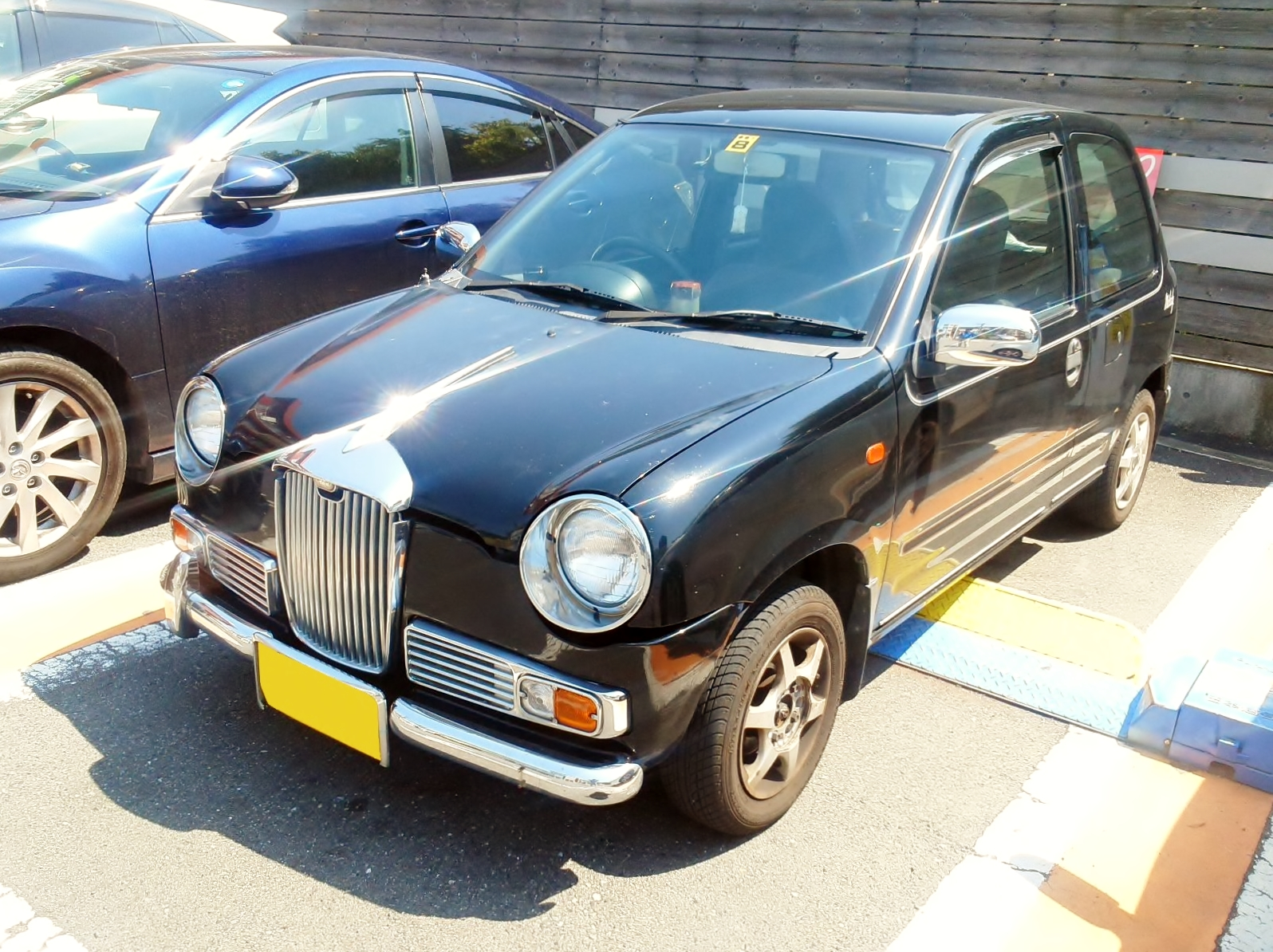 初代光岡・レイ660をフロントから撮影。